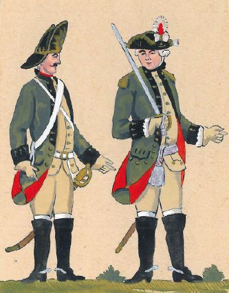 64. Grenadier Konnej Kompanii Artylerii Freya (Artillerie Grenadier Frey Compagnie zu Pferde) (szeregowy i oficer frajkompanii konnej korpusu artylerii litewskiej